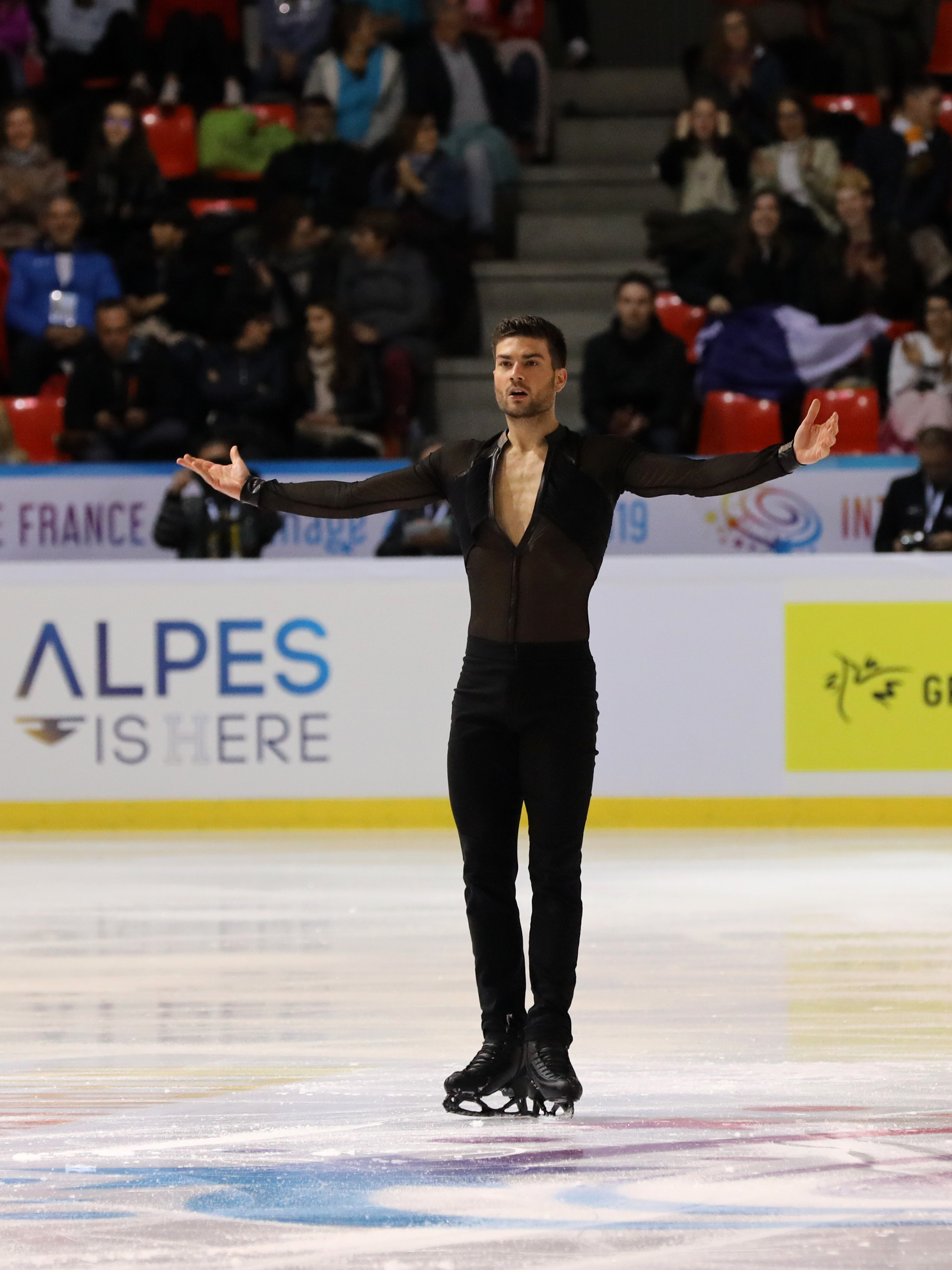 Romain Ponsart, programme court aux Internationaux de France 2019.